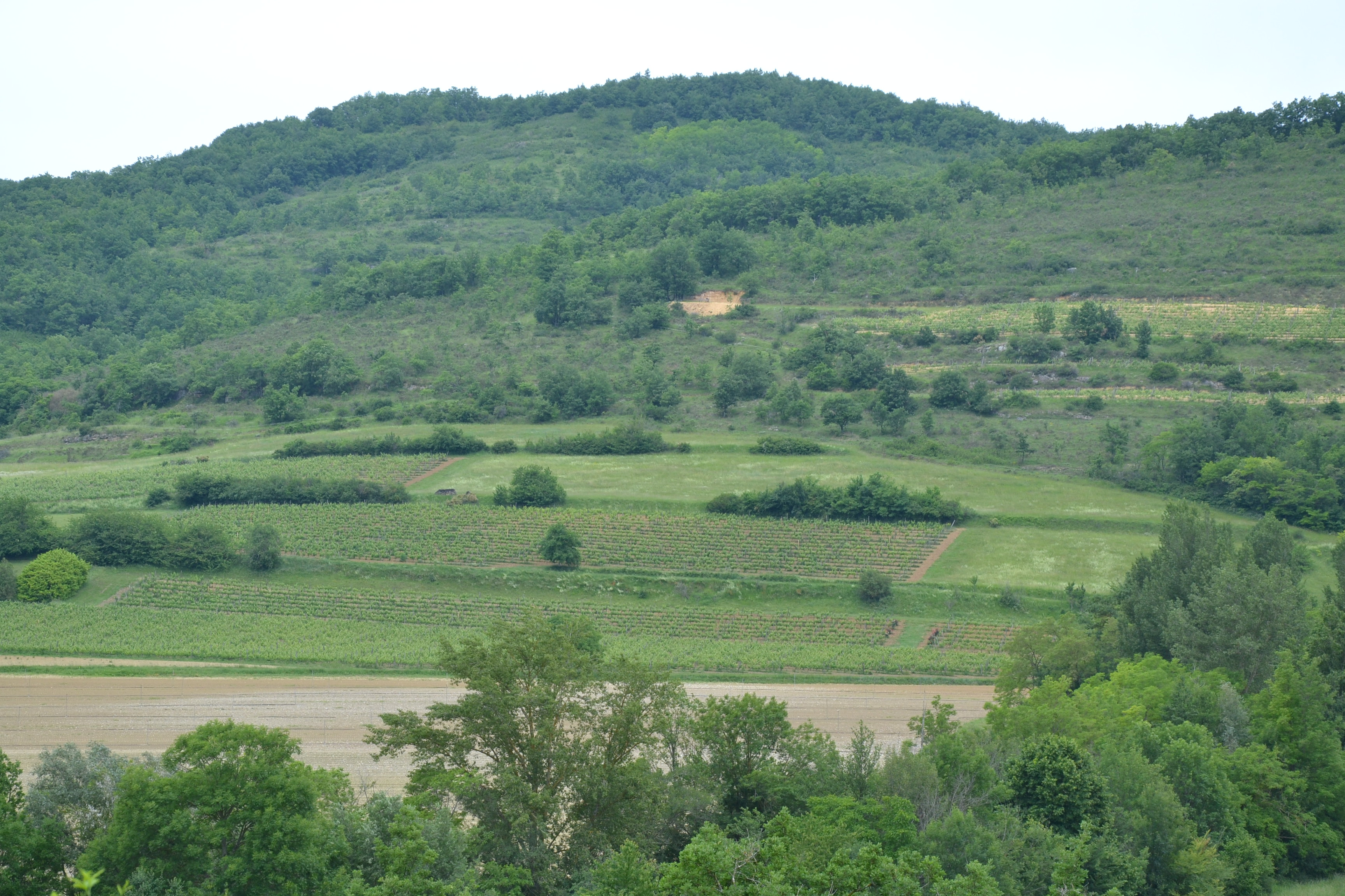 Les vignes d'Engraviès, commune de Dun (Ariège, France).